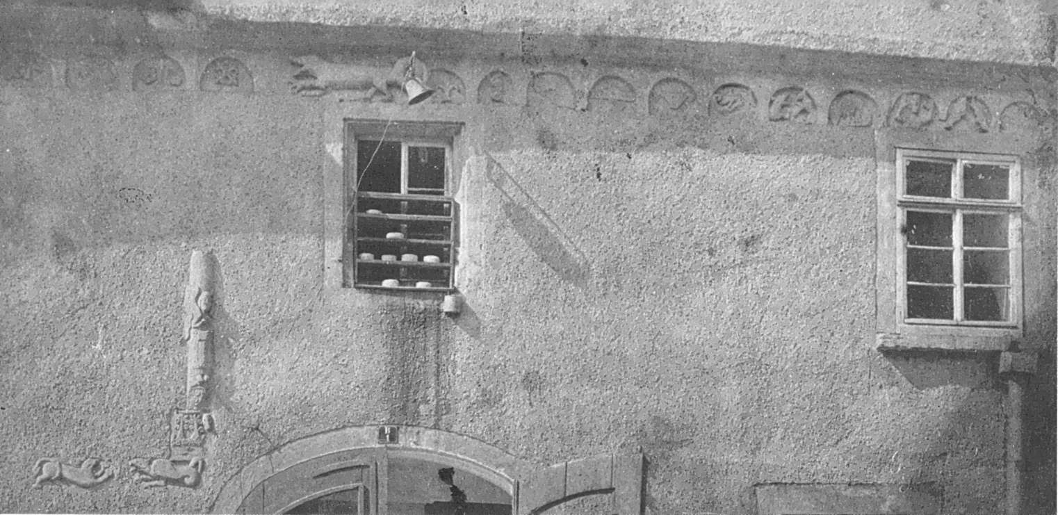 Tübingen, Schwärzloch, Reste romanischer Bauskulptur an der ehemaligen Kapelle, Sinner-Archiv 1/774, 226*111 mm